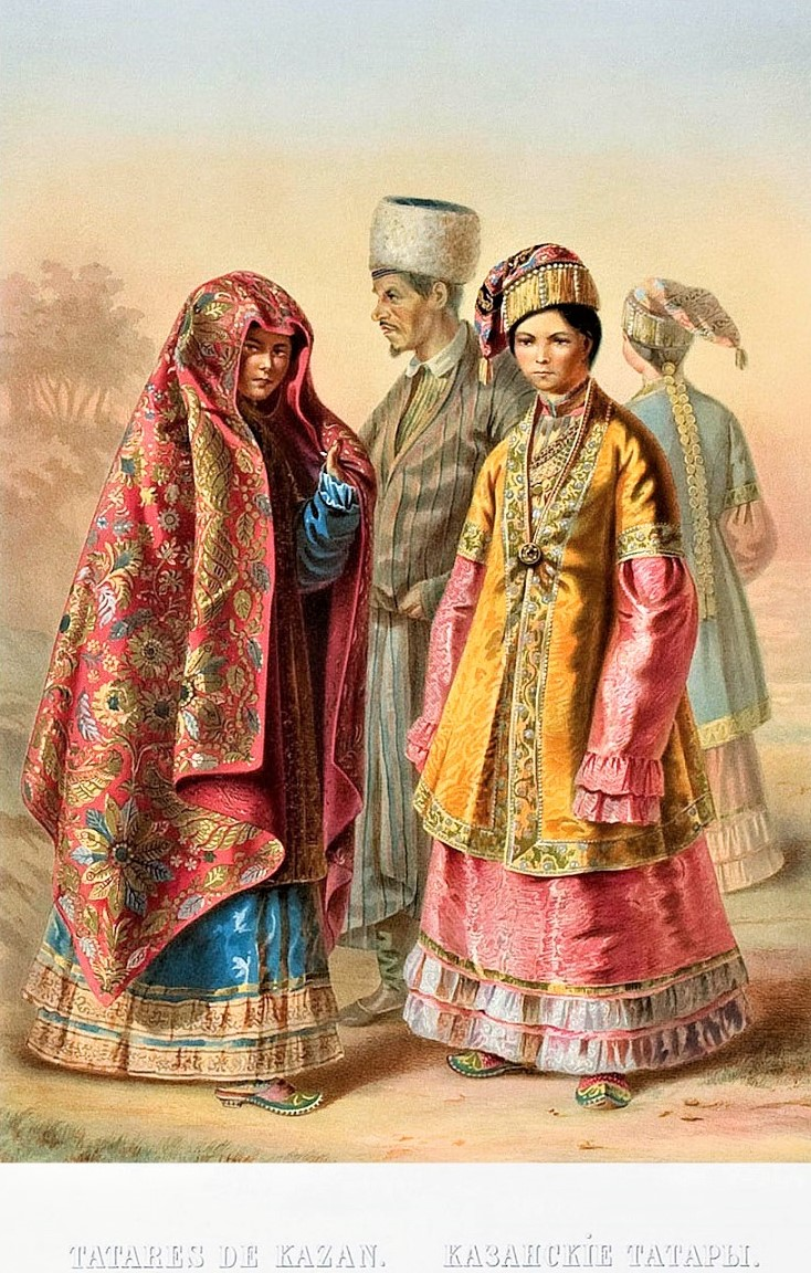 Казанские татары. Этнографическое описание народов России Густава-Федора Христиановича Паули